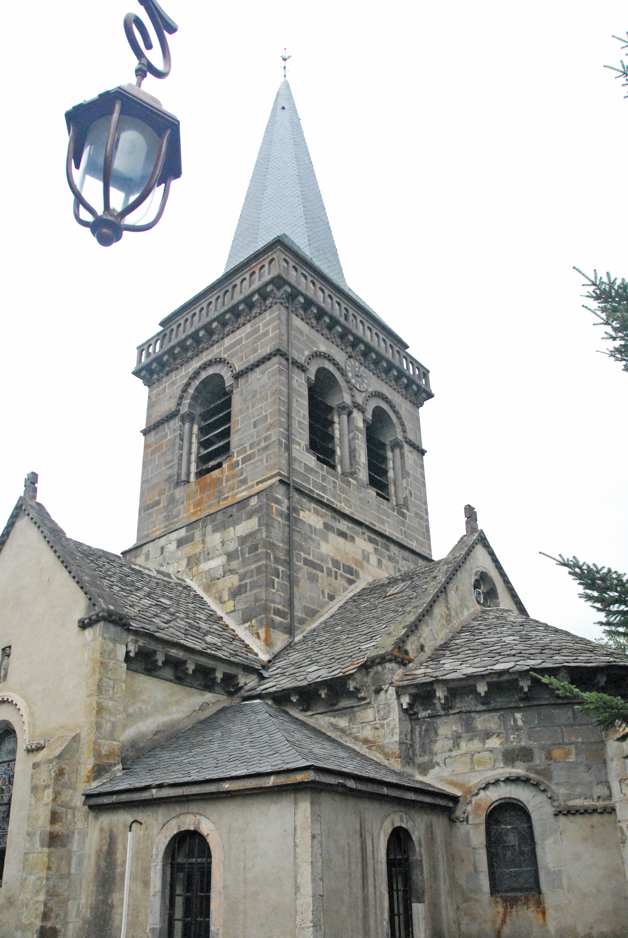 Dorfkirche Chambon-sur-Lac, Chorhaupt v. SO